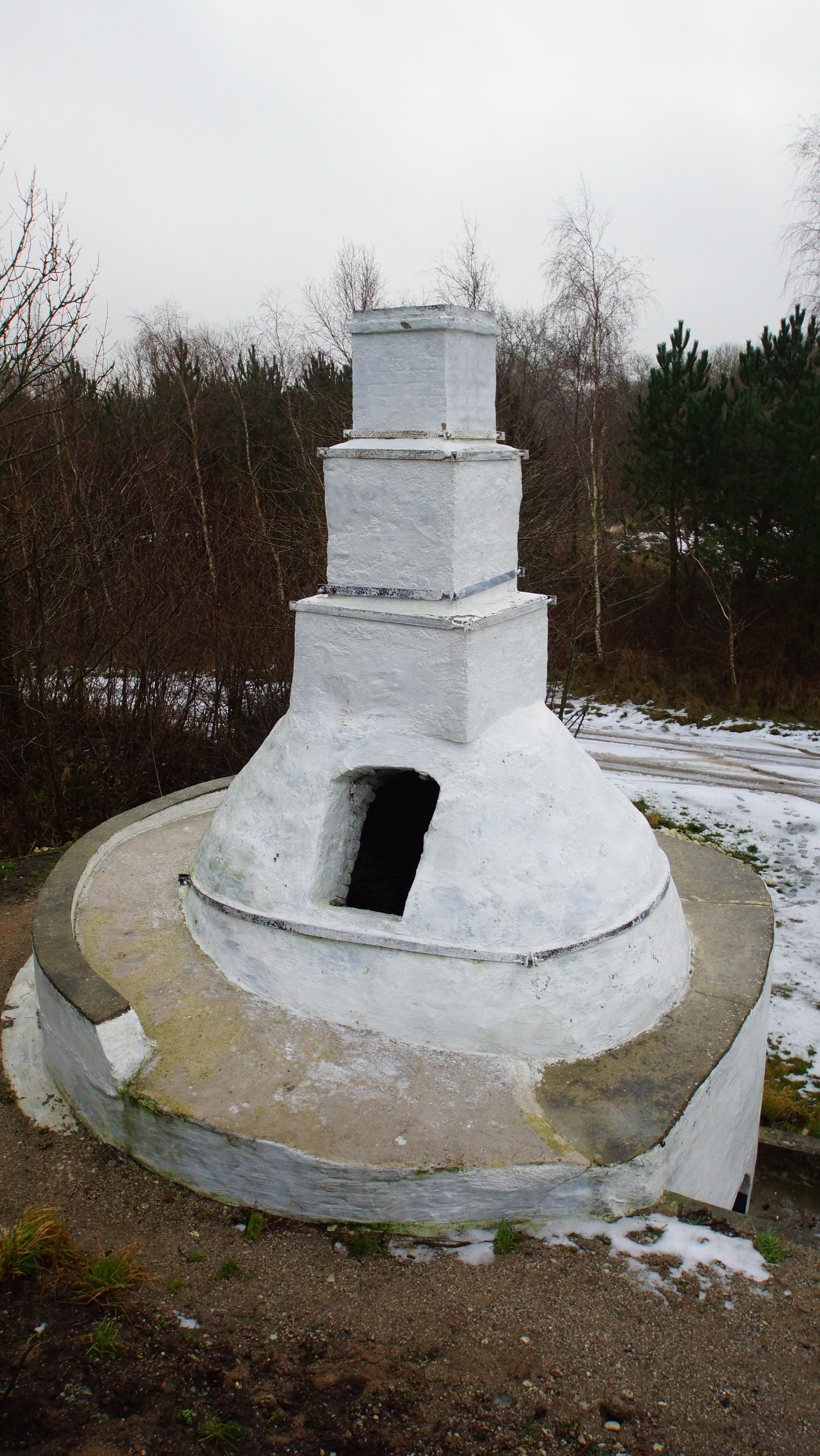 Kalkbrændeovn, Birkesig, Djursland